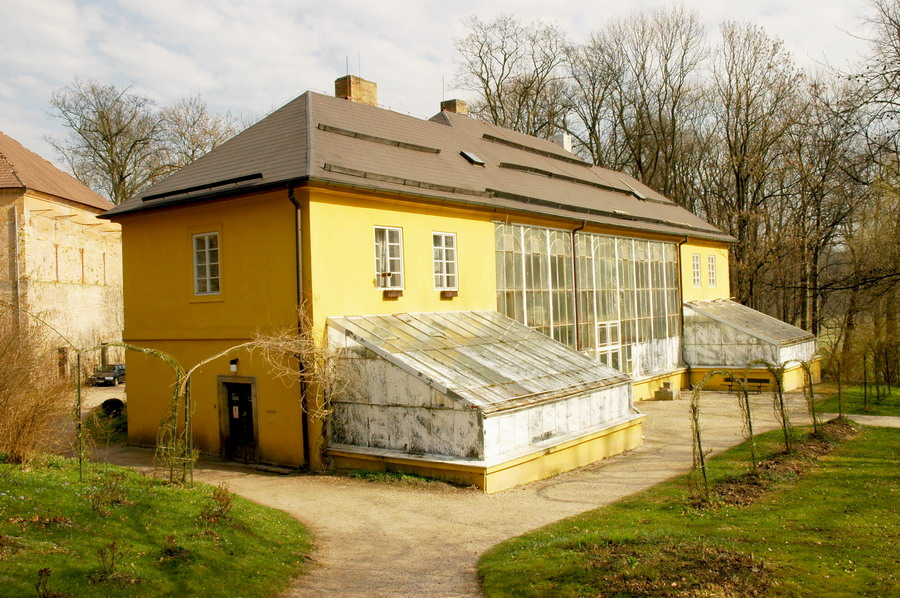 Ratibořice, zámek, skleník